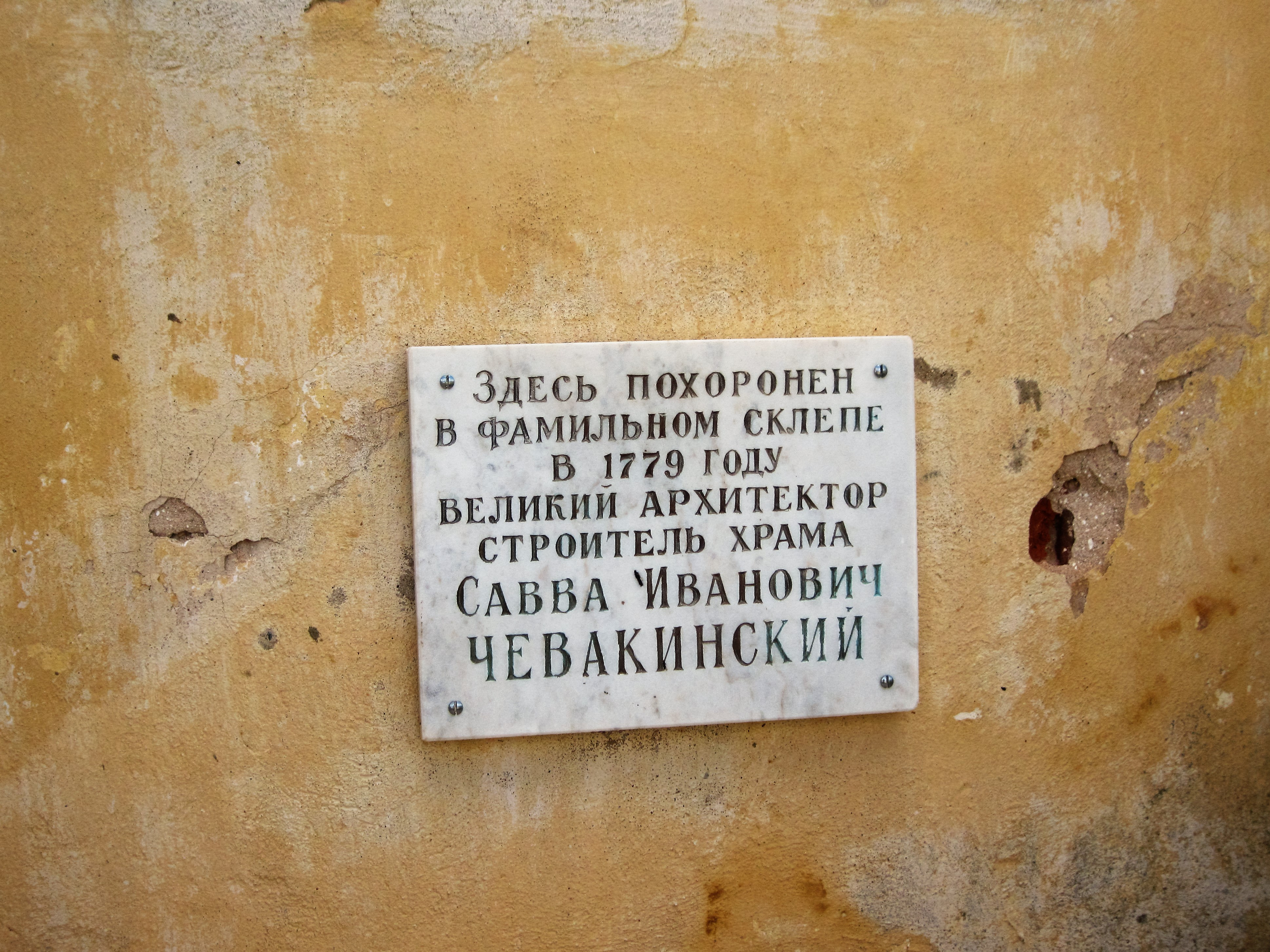 Мемориальная доска на храме Смоленской Божией Матери в селе Выдропужск Спирвского района Тверской области